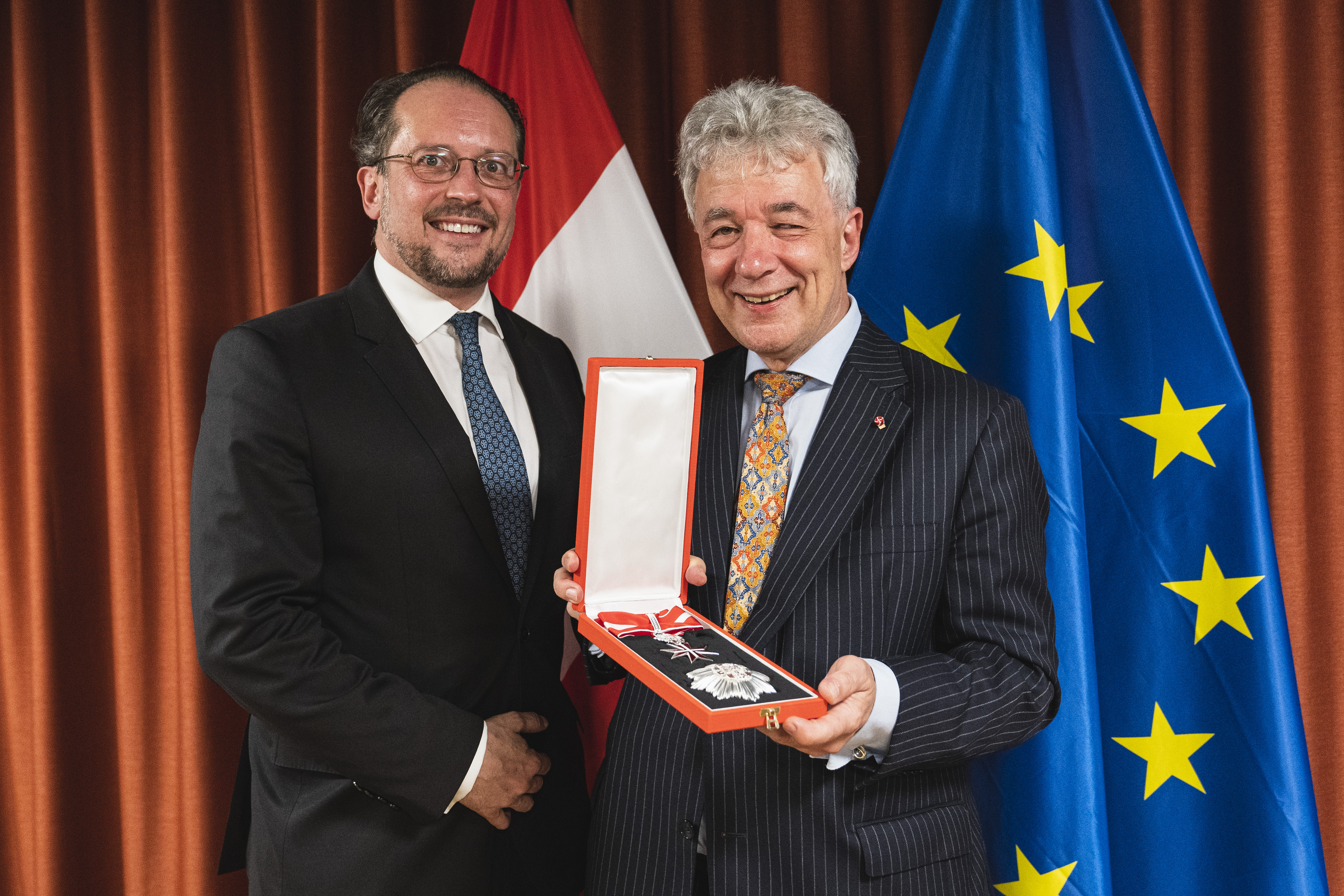 Alexander Schallenberg verlieh das Große Silberne Ehrenzeichen mit Stern für Verdienste um die Republik Österreich an Botschafter Thomas Mayr-Hartingin in Brüssel, 15. Juli 2019 Copyright: BMEIA/ Eugénie Berger